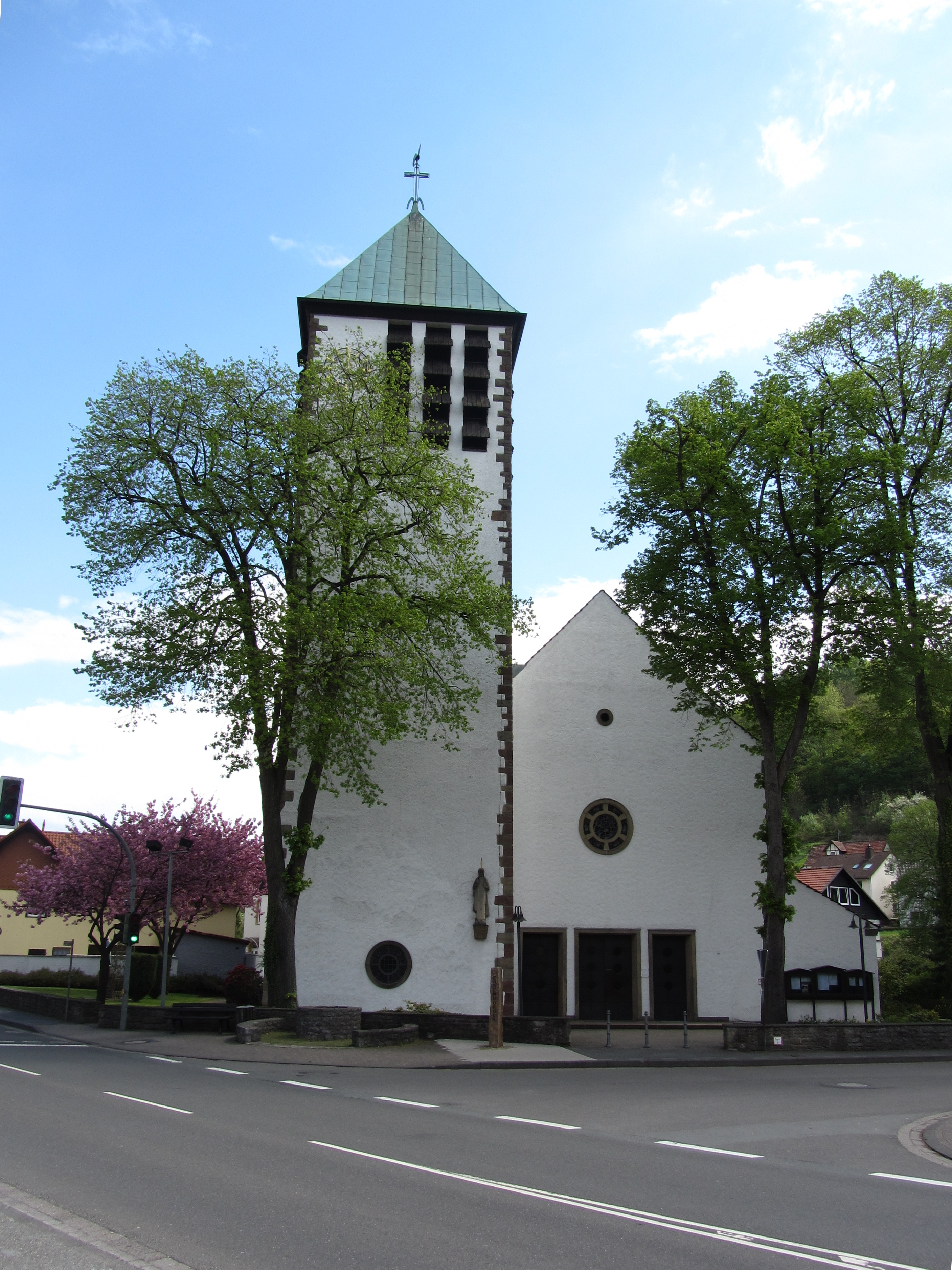 Ansicht vom "Urental"